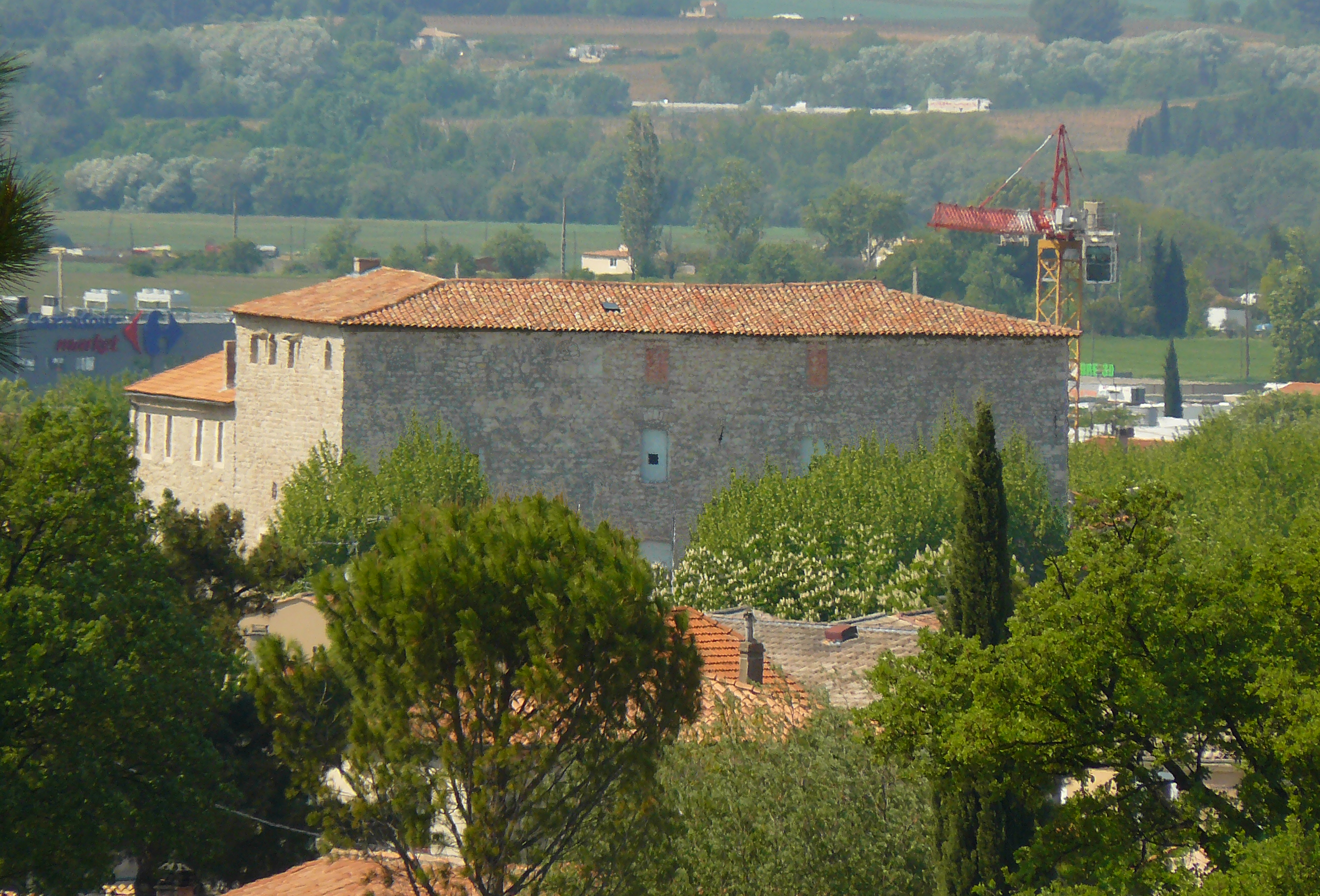 Vue du Château de Trets depuis le chemin du Félibre